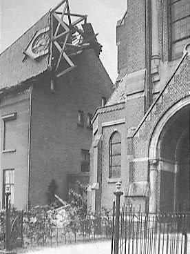 Torenspits valt op parochie Kwadendamme 1911